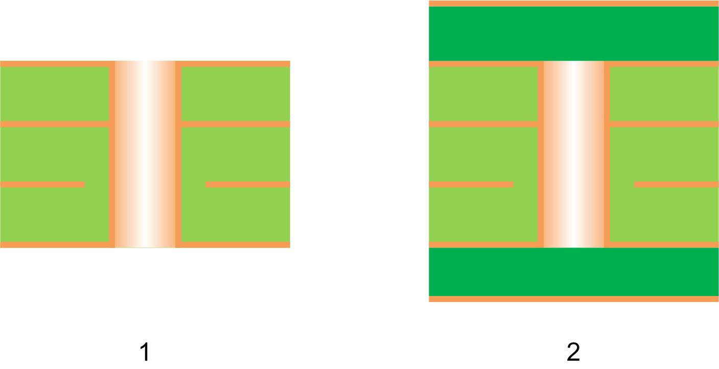 Processus fabrication via enterré